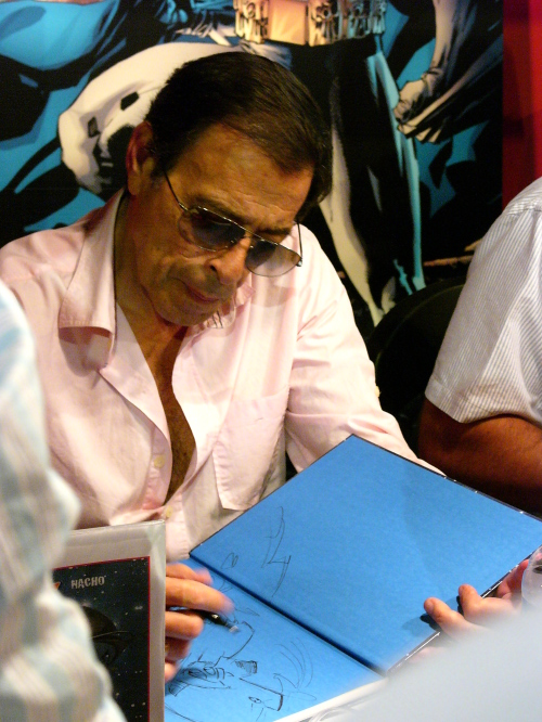 Spaniard comic-book creator Alfonso Azpiri signing at the 27è Saló Internacional del Còmic de Barcelona